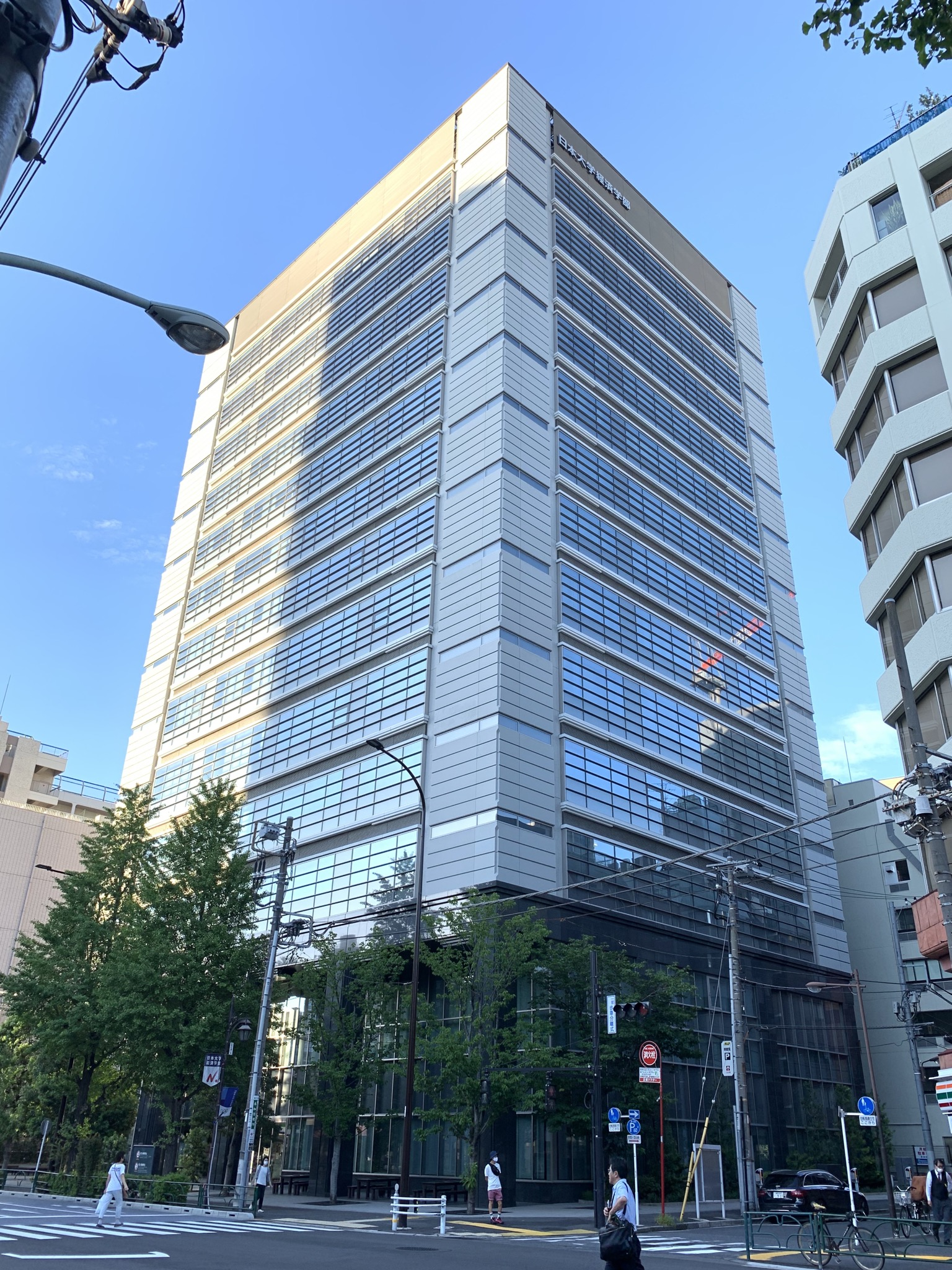 東京都千代田区西神田1丁目2-7に所在する日本大学経済学部3号館